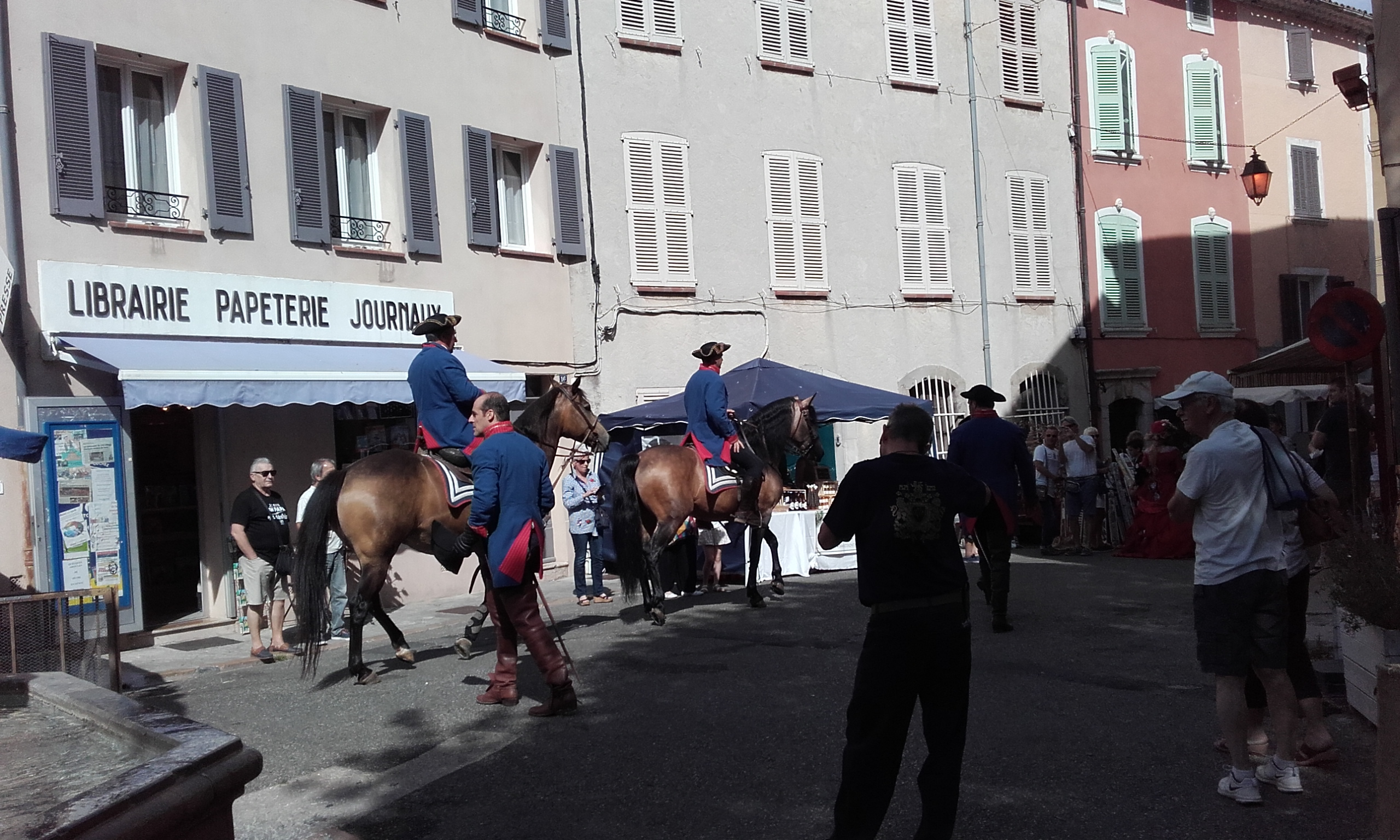 Var, Besse-sur-Issole, journée du 18e siècle le 15 juin 2019.